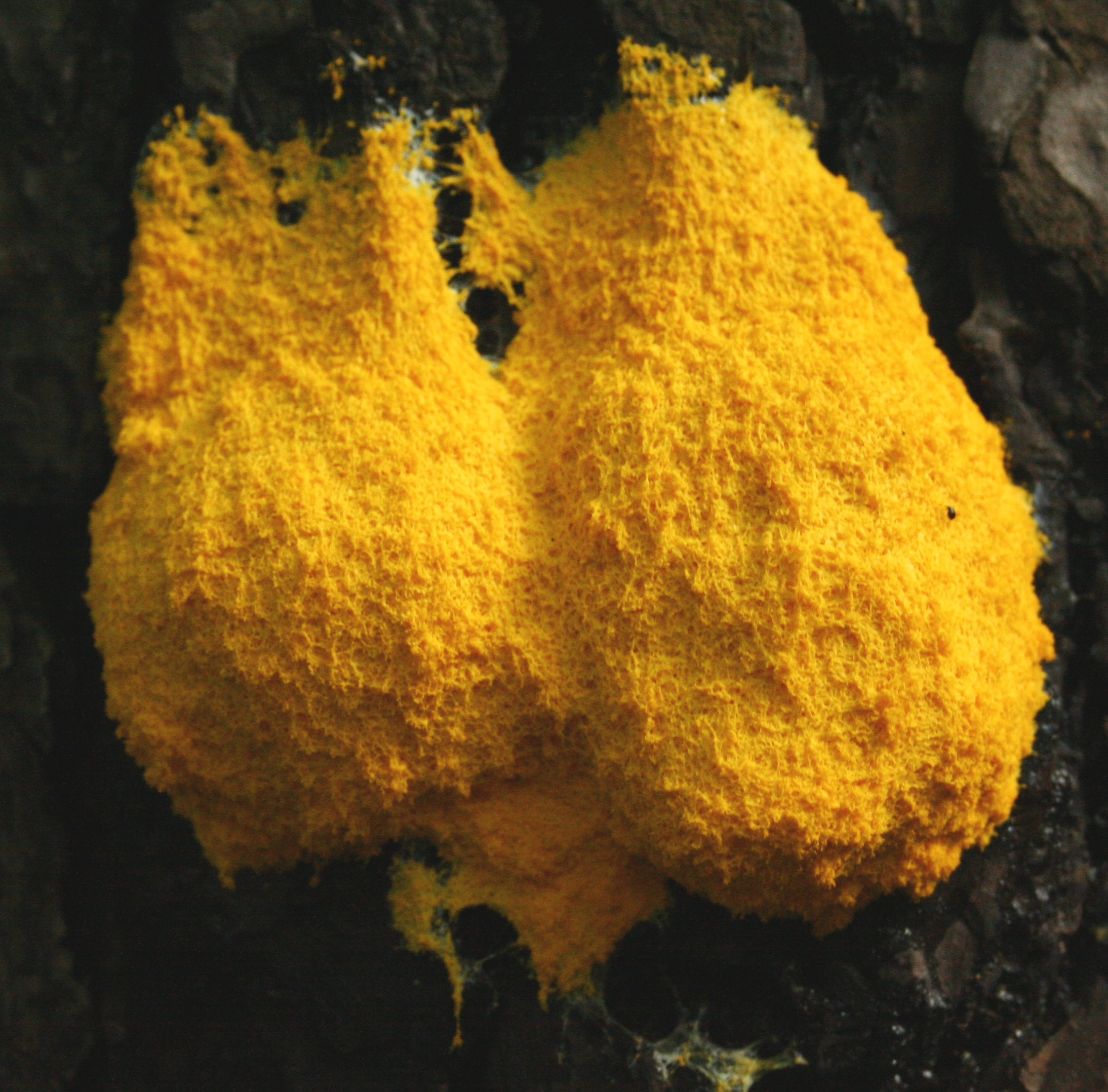 Śluzorośla, rezerwat "Lisia Góra", w Rzeszowie - wykwit zmienny (Fuligo septica)